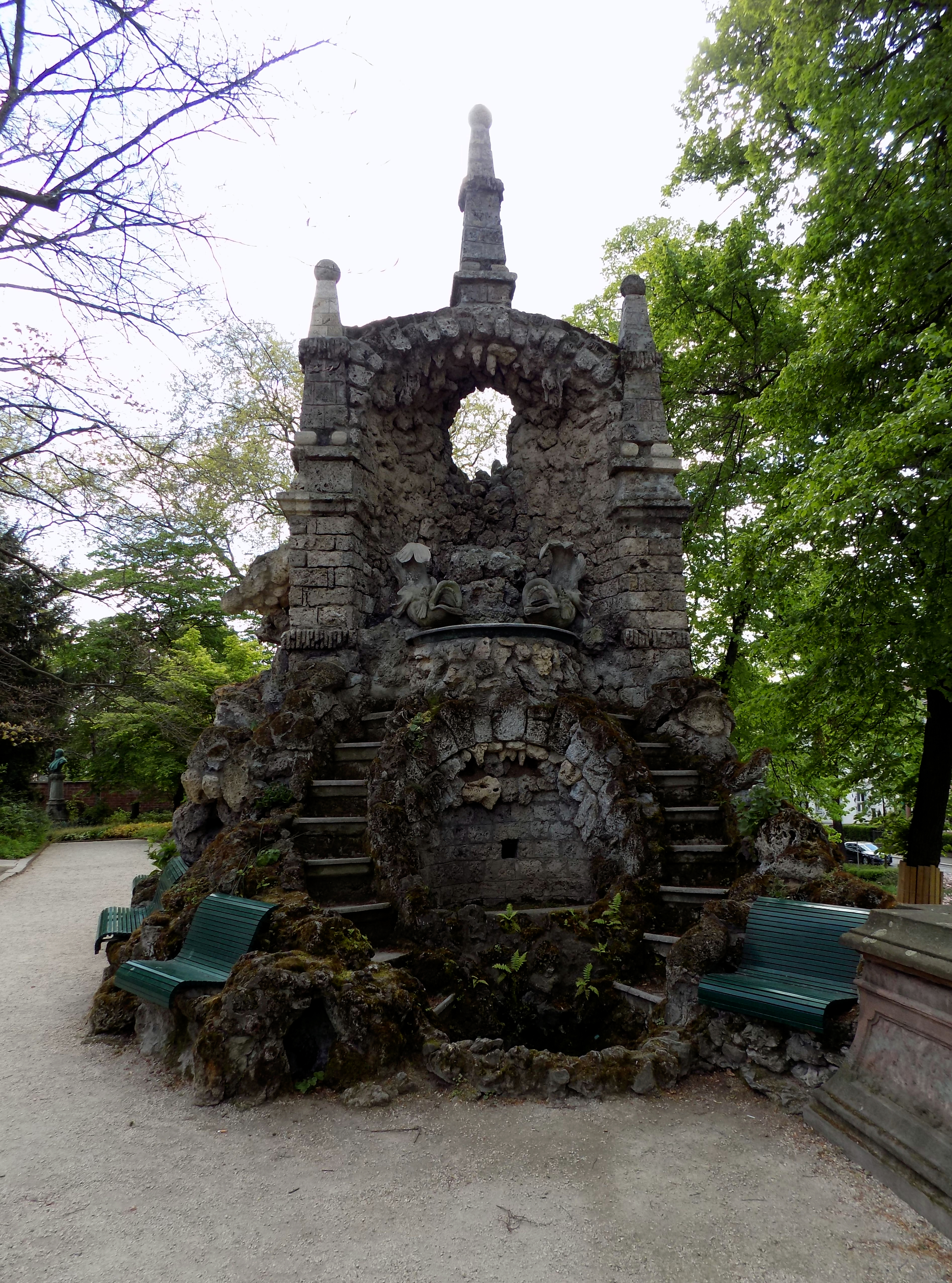 Herkulesbrunnen (Worms) - Frontansicht